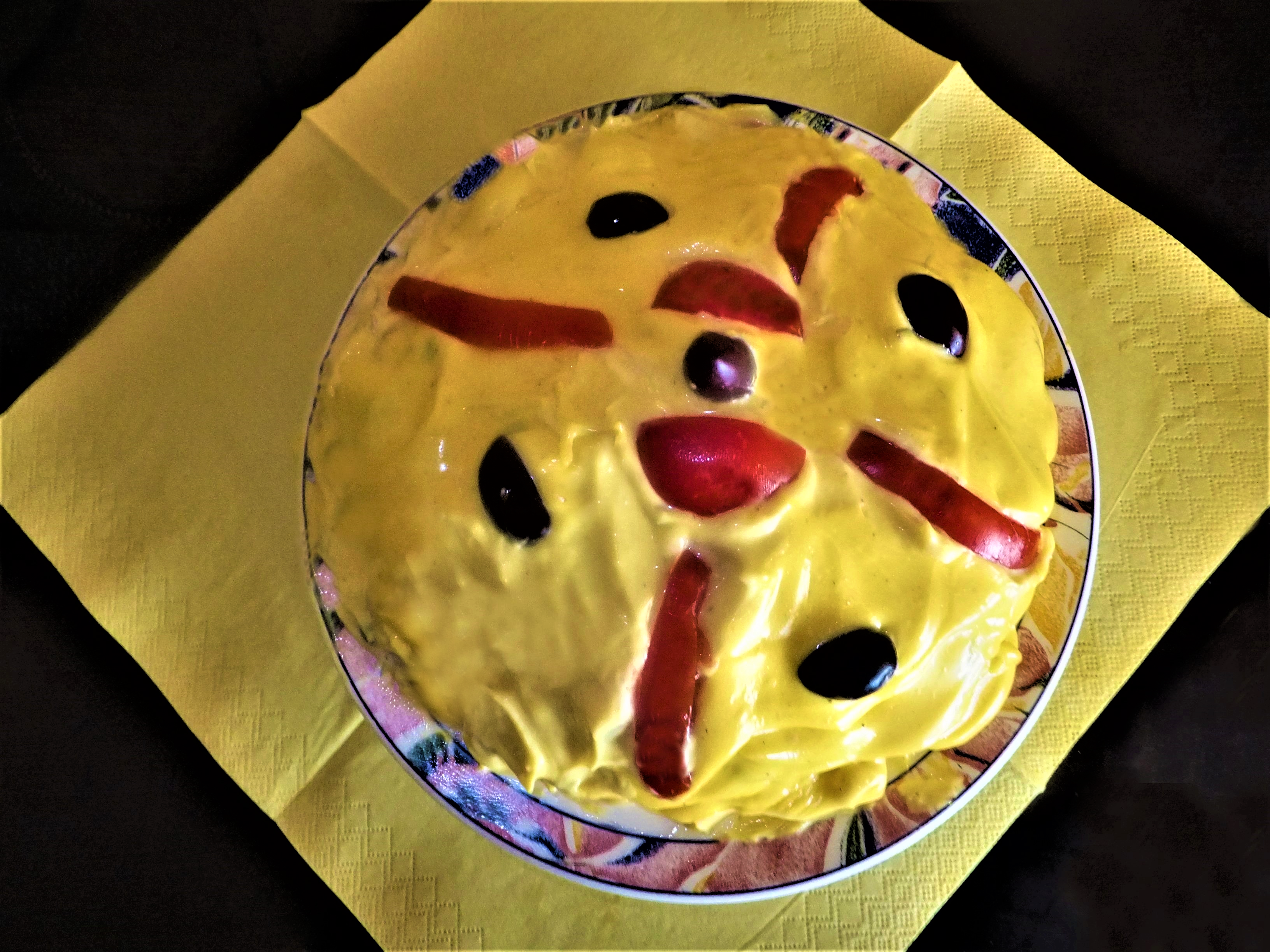 Salată de boeuf (Rindfleisch, Kartoffeln, Karotten, Erbsen, Salzdillgurken, Dill, Petersilie, schw. Pfeffer, Mayonnaise)